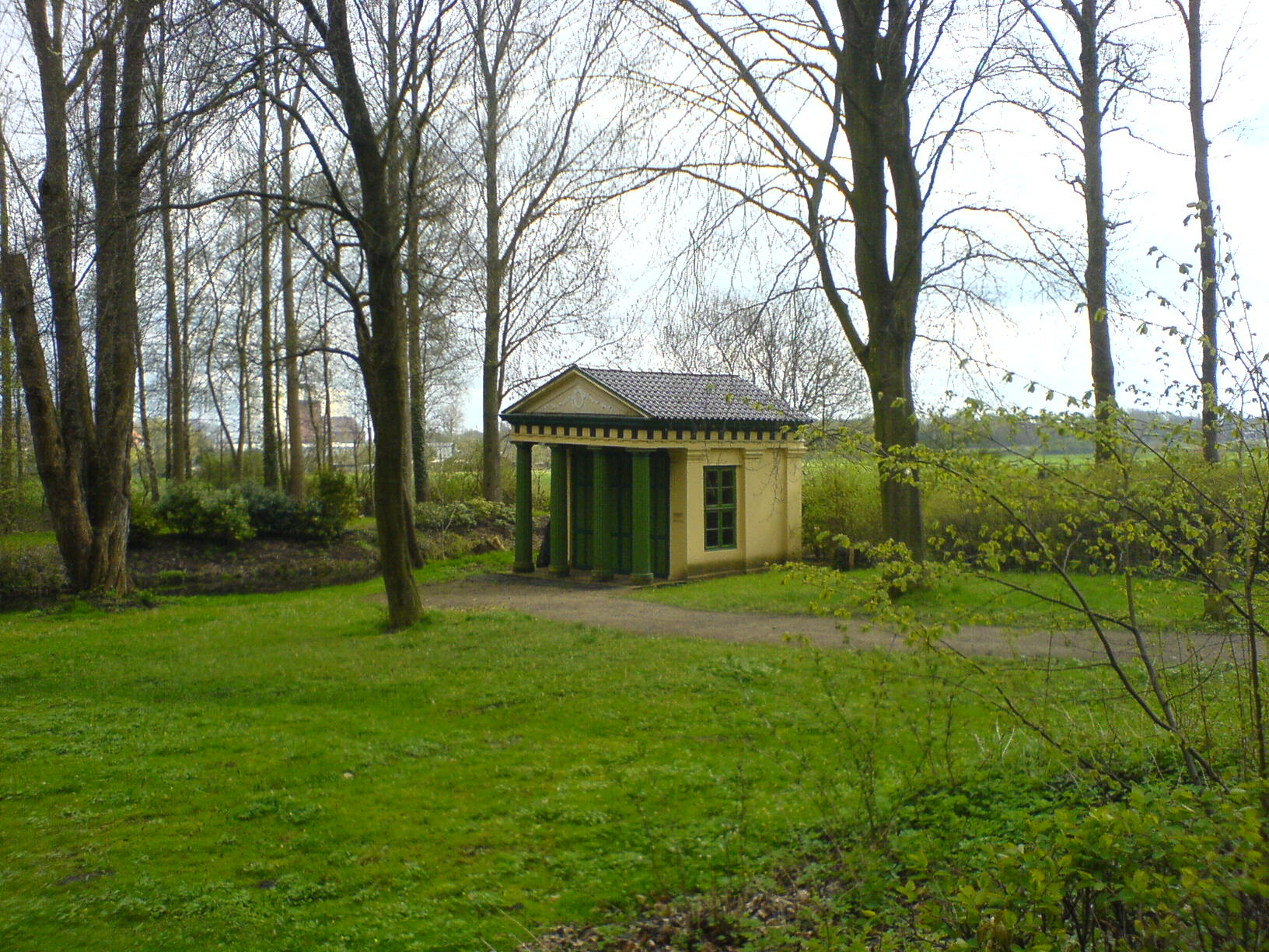 Teehaus Uetersen